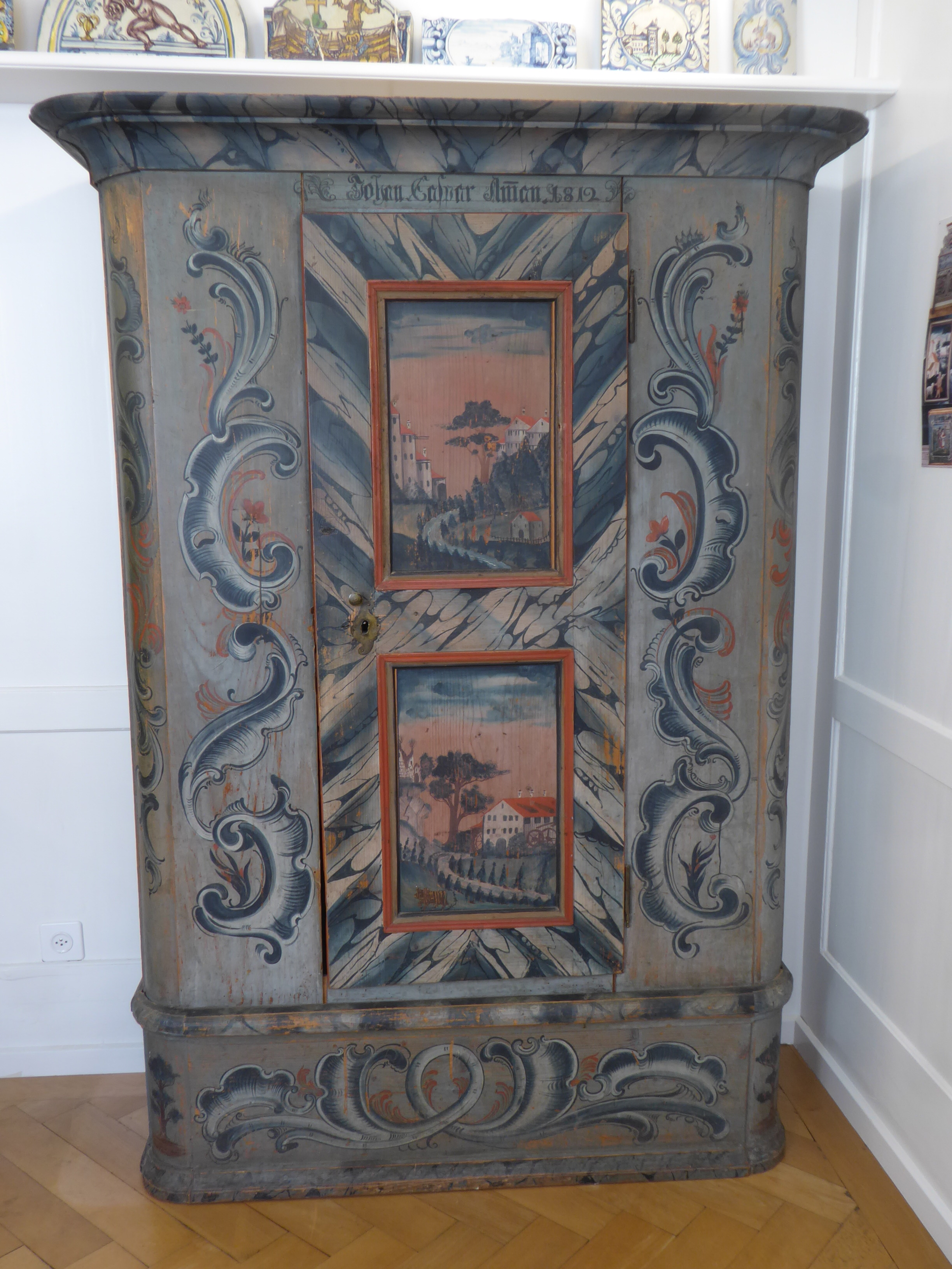 Schrank im Toggenburger Museum. Lichtensteig, 1812